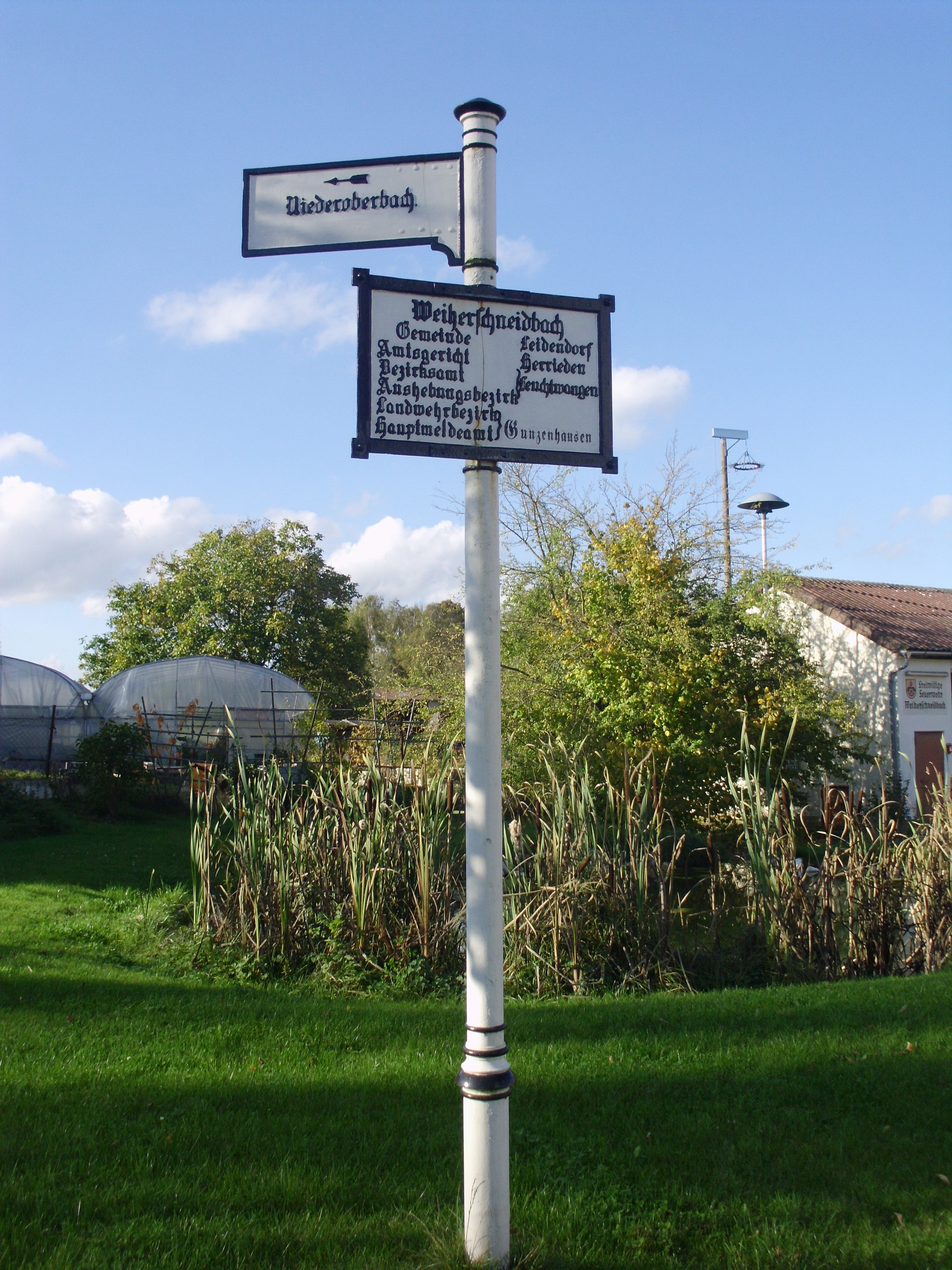 Historischer Wegweiser in Weihenschneidbach, Ortsteil von Weidenbach (Mittelfranken)